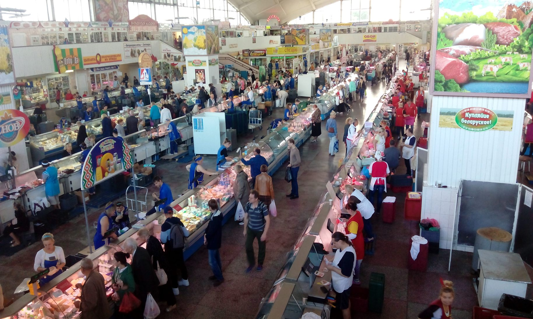 Камароўка, Гандлёвыя рады, Мінск, Беларусь, 2016